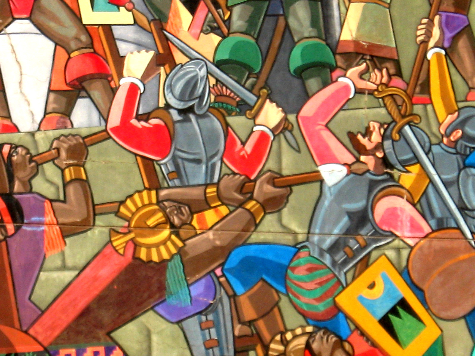 Soldado Inca ataca a Conquistador español